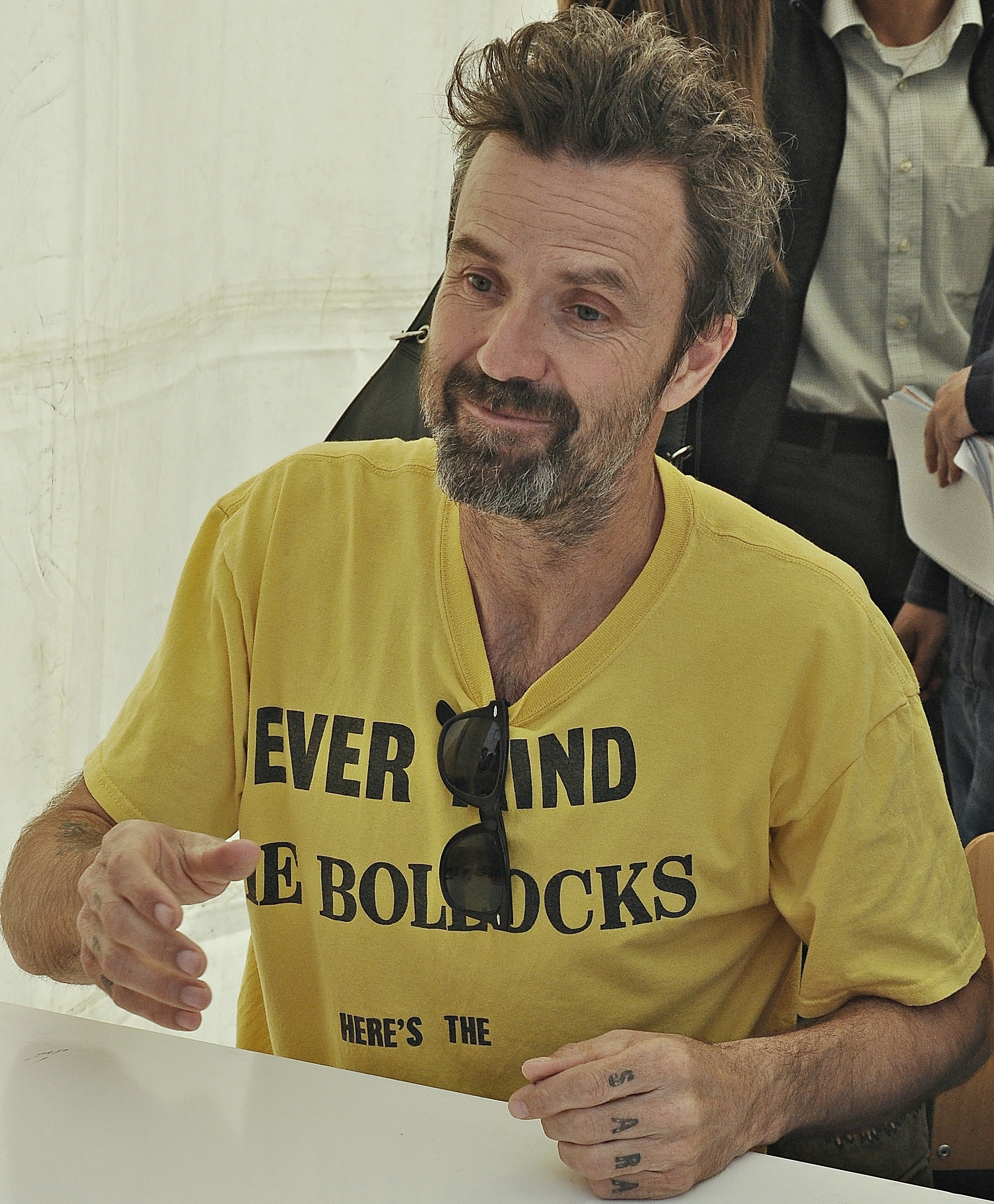 Pau Dones